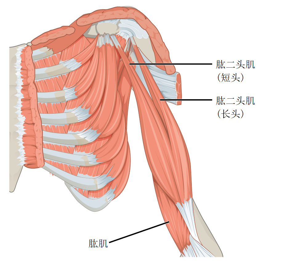 其它版本（英文）： 基于：